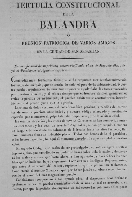 La Sociedad Patriótica de San Sebastián Donostiako elkartearen sorrera agiria, 1820